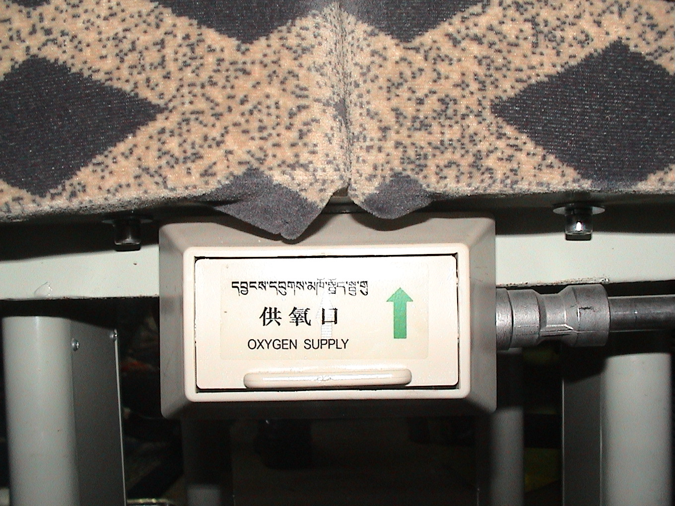 青藏铁路的列车上的供氧口